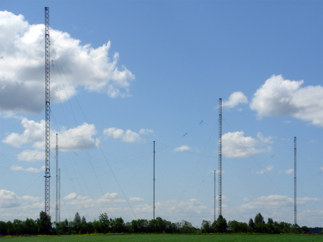 Радиостанция «Голиаф».